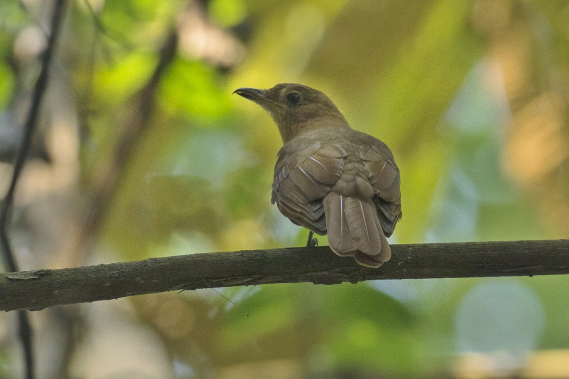 Rufous Piha - Los Cusingos - Costa Rica_MG_7504